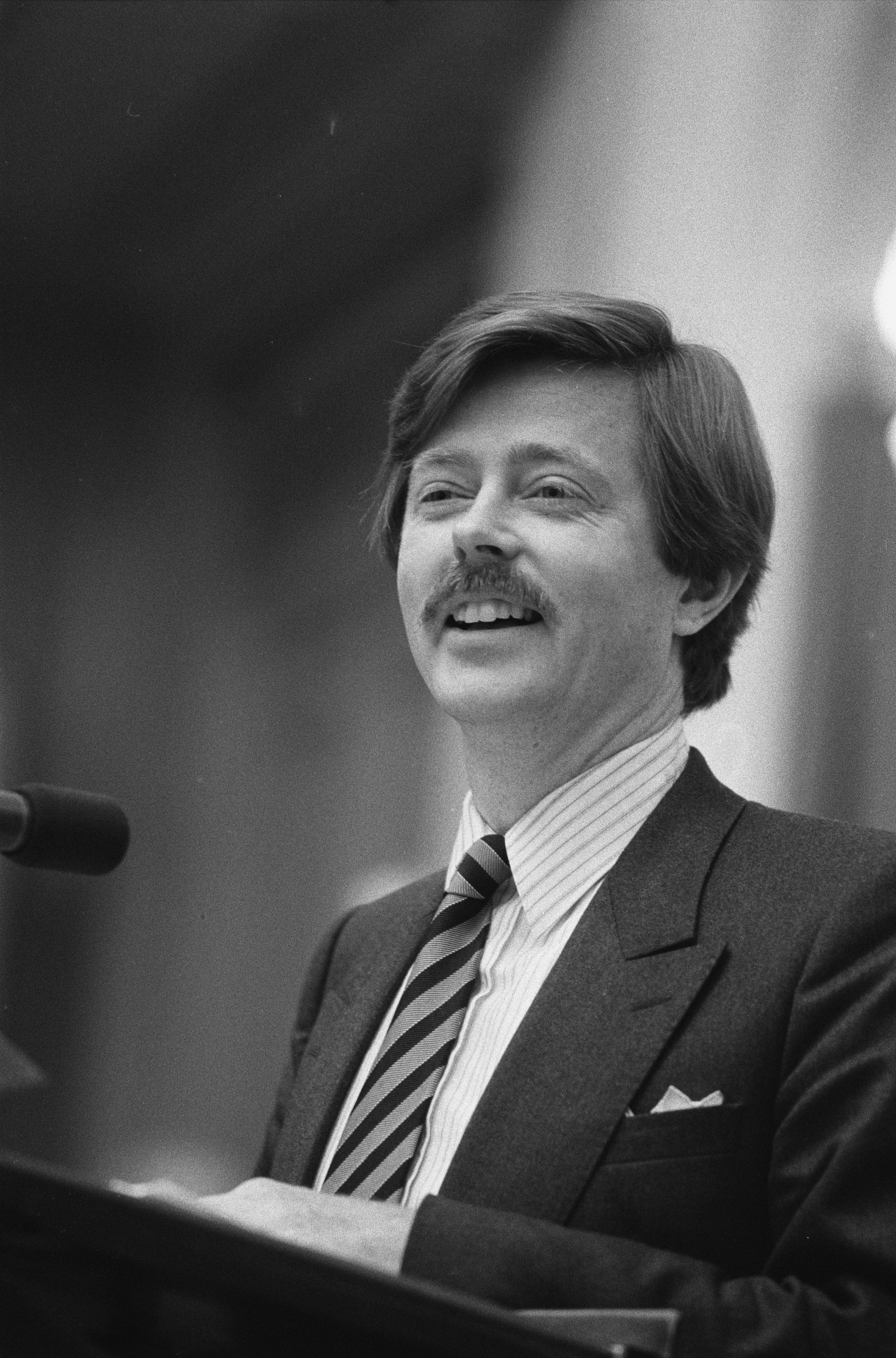 Collectie / Archief : Fotocollectie Anefo Reportage / Serie : [ onbekend ] Beschrijving : Regeringsverklaring tweede termijn ; VVD-woordvoerder Voorhoeve tijdens rede, kop Datum : 1 augustus 1986 Trefwoorden : REGERINGSVERKLARINGEN Persoonsnaam : Voorhoeve, Joris Fotograaf : Bogaerts, Rob / Anefo Auteursrechthebbende : Nationaal Archief Materiaalsoort : Negatief (zwart/wit) Nummer archiefinventaris : bekijk toegang 2.24.01.05 Bestanddeelnummer : 933-7208